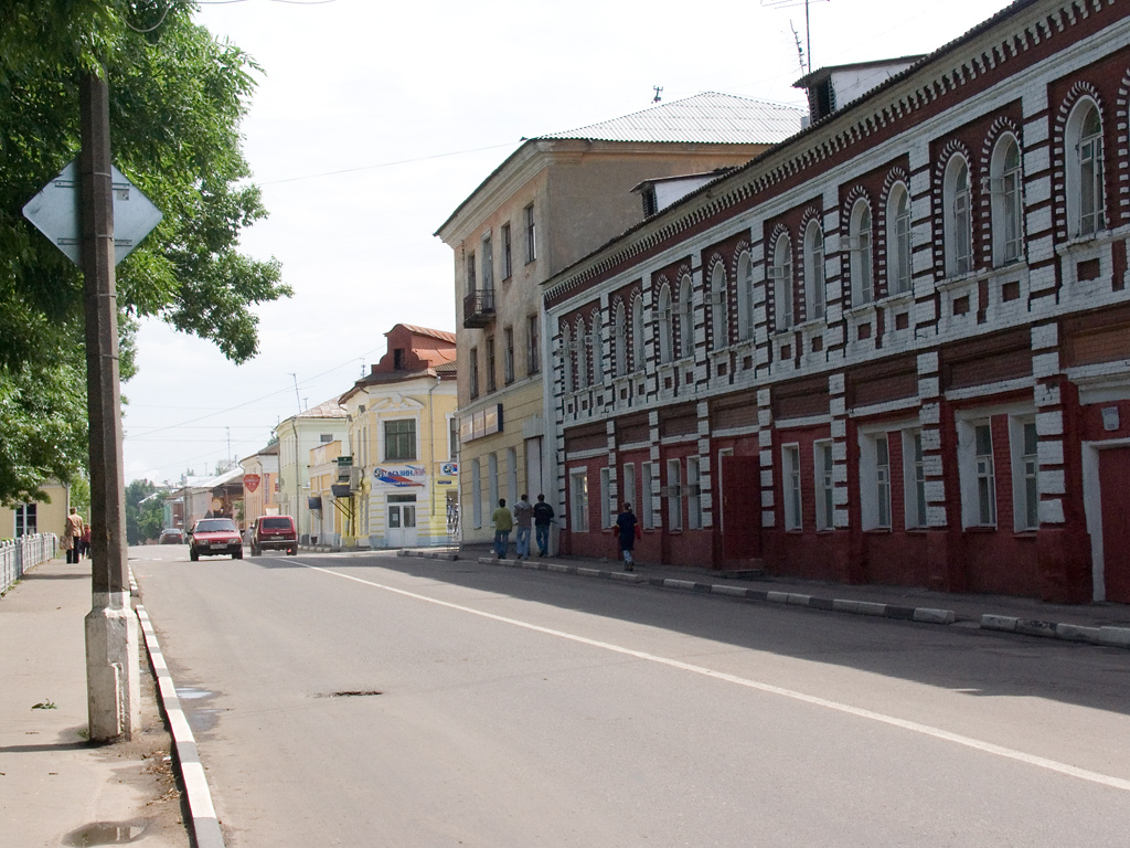 Улица Красногвардейская в Коломне (возле сквера имени Зайцева)